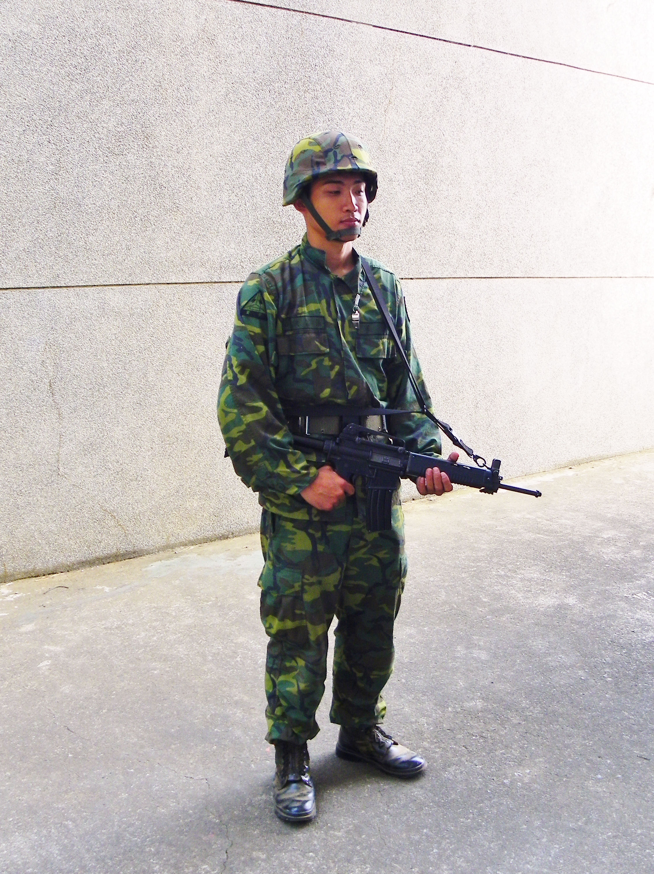 2011年陸軍湖口營區開放活動，中興臺東側通道執勤的裝甲兵警衛。